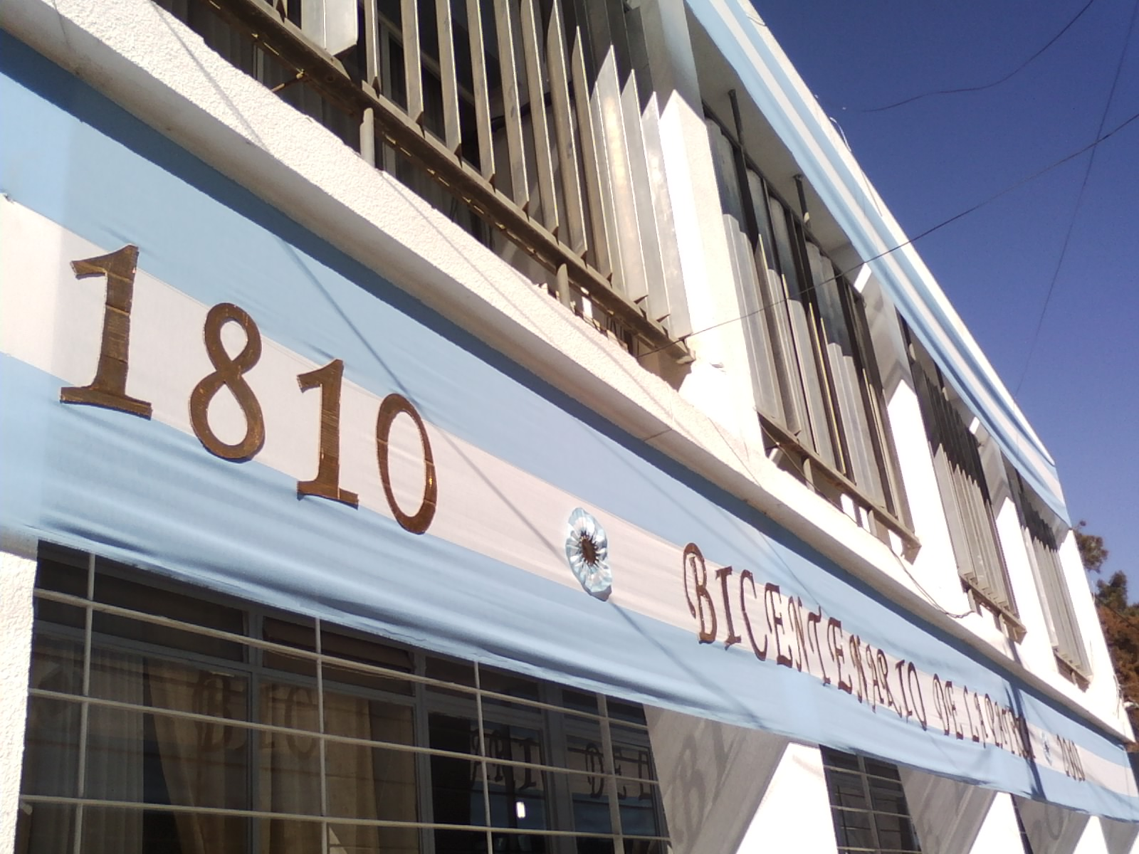 Ornamentación utilizada para el Bicentenario de la Patria (1810~2010)